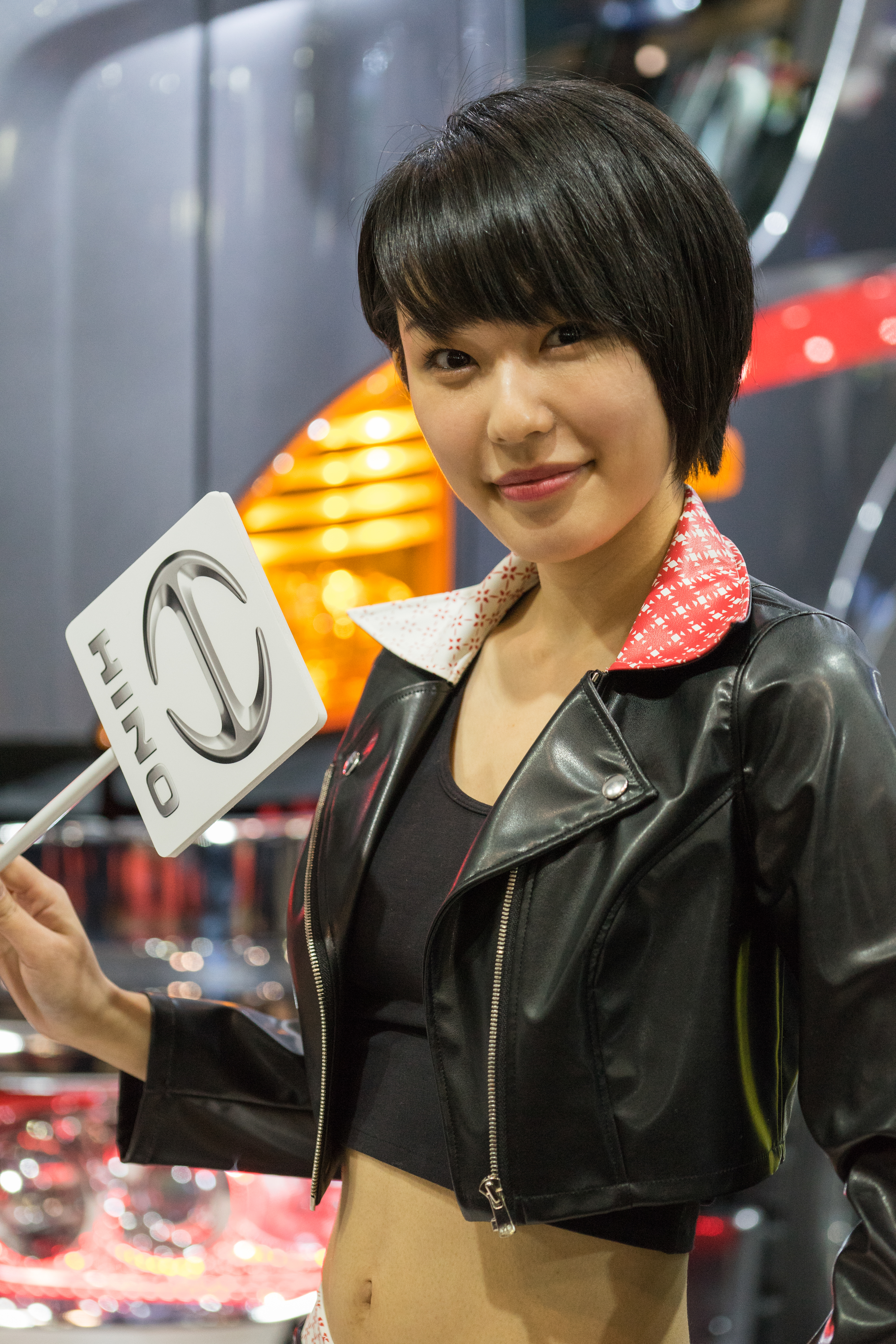 TOKYO AUTO SALON 2017 （東京オートサロン2017）-42.jpg